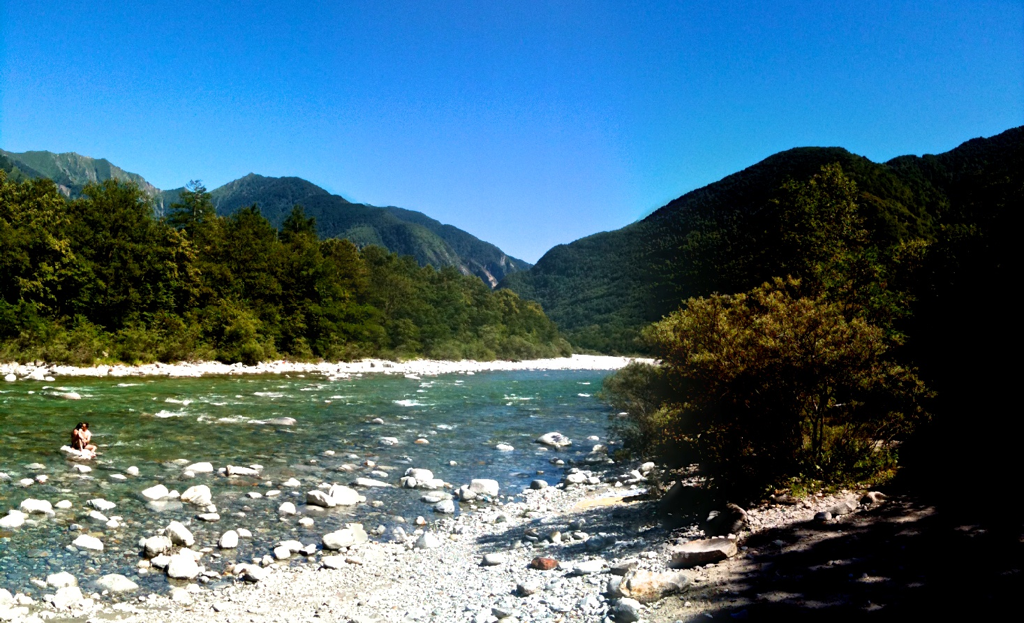 Maggia, Aurgeno